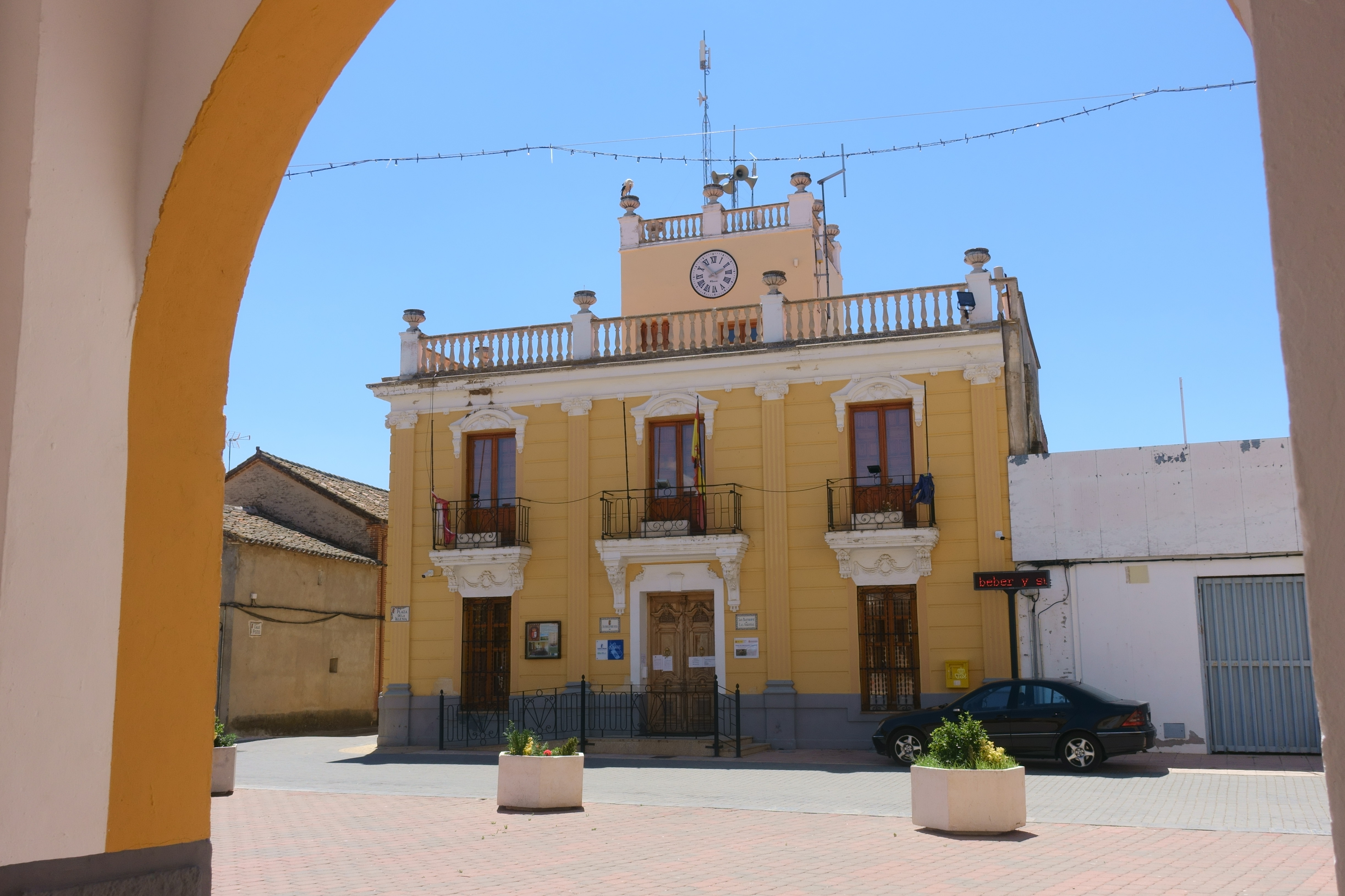 Casa consistorial de San Bartolomé de las Abiertas (Toledo, España).